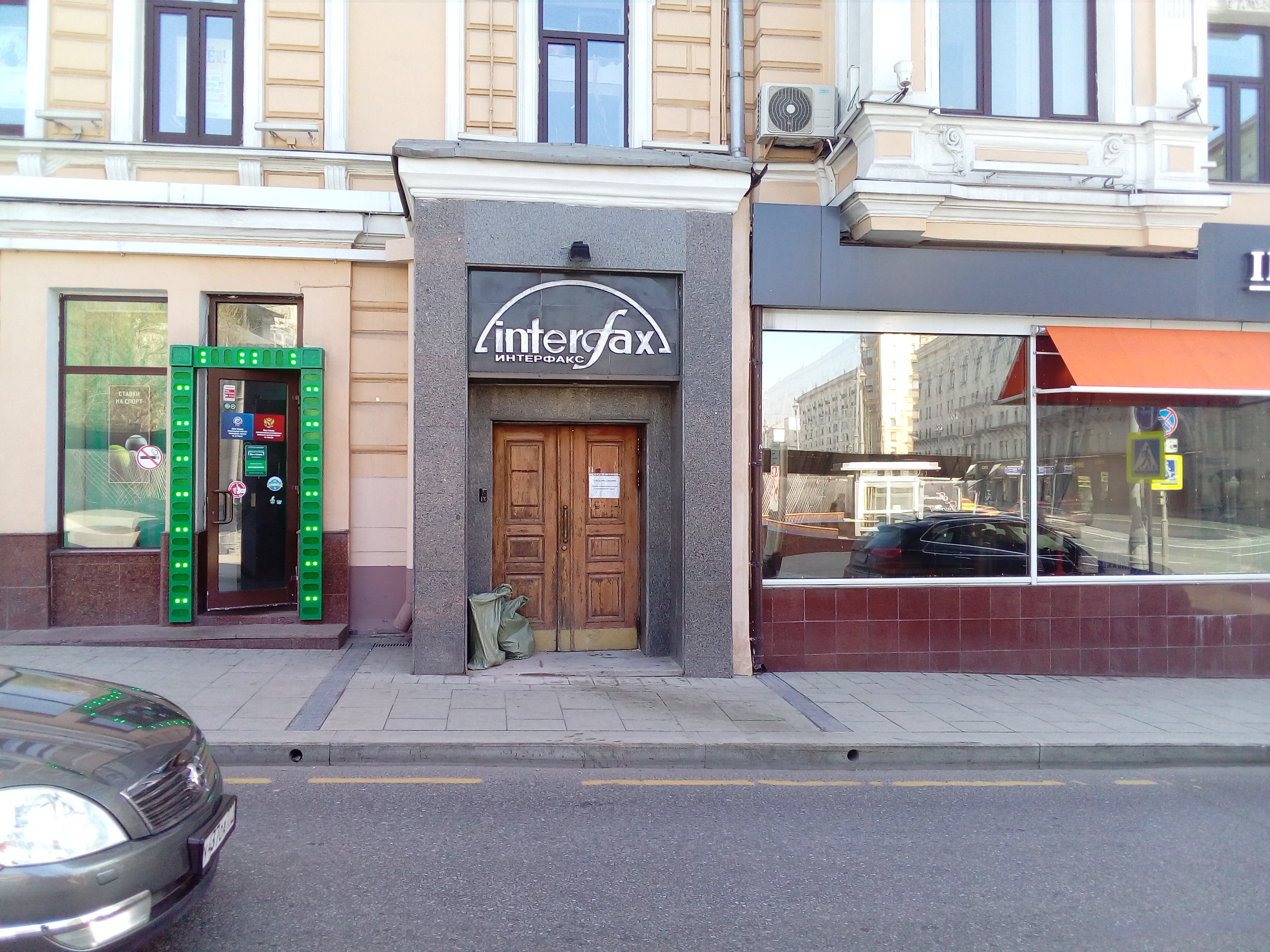 Здание информационного агентства "Интерфакс". Москва, 30 апреля 2018г.